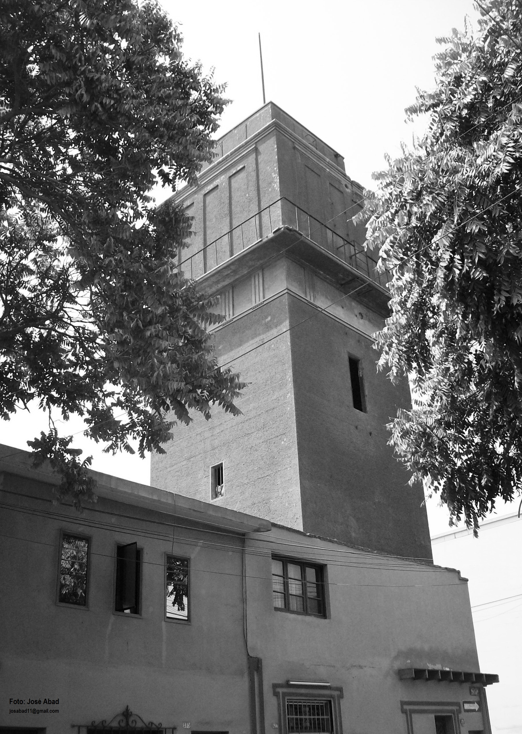 Mirador del Árabe en la segunda cuadra del Jirón iquique, en el distrito de Breña.